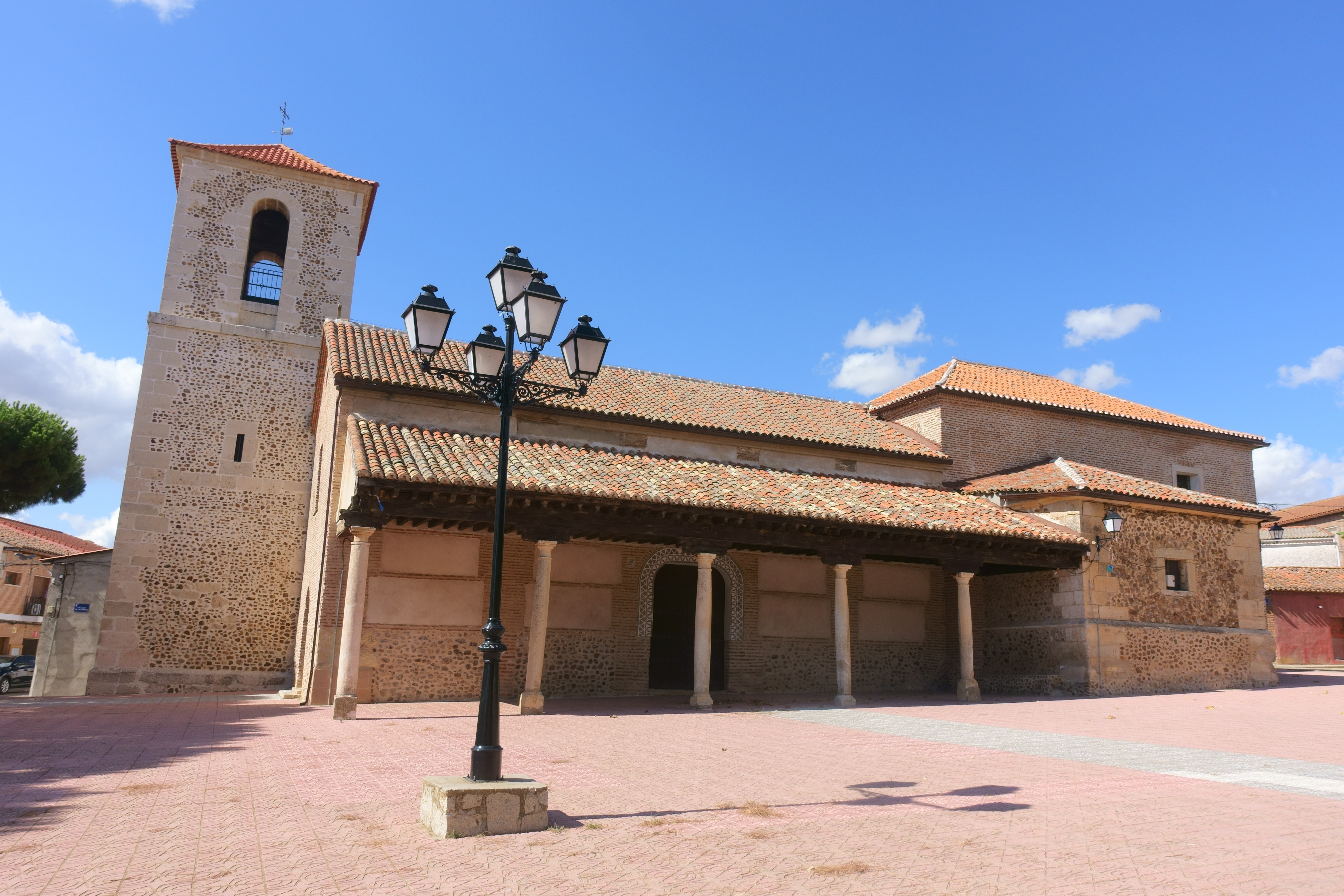 Iglesia de San Bernabé, Valdenuño Fernández (Guadalajara, España).